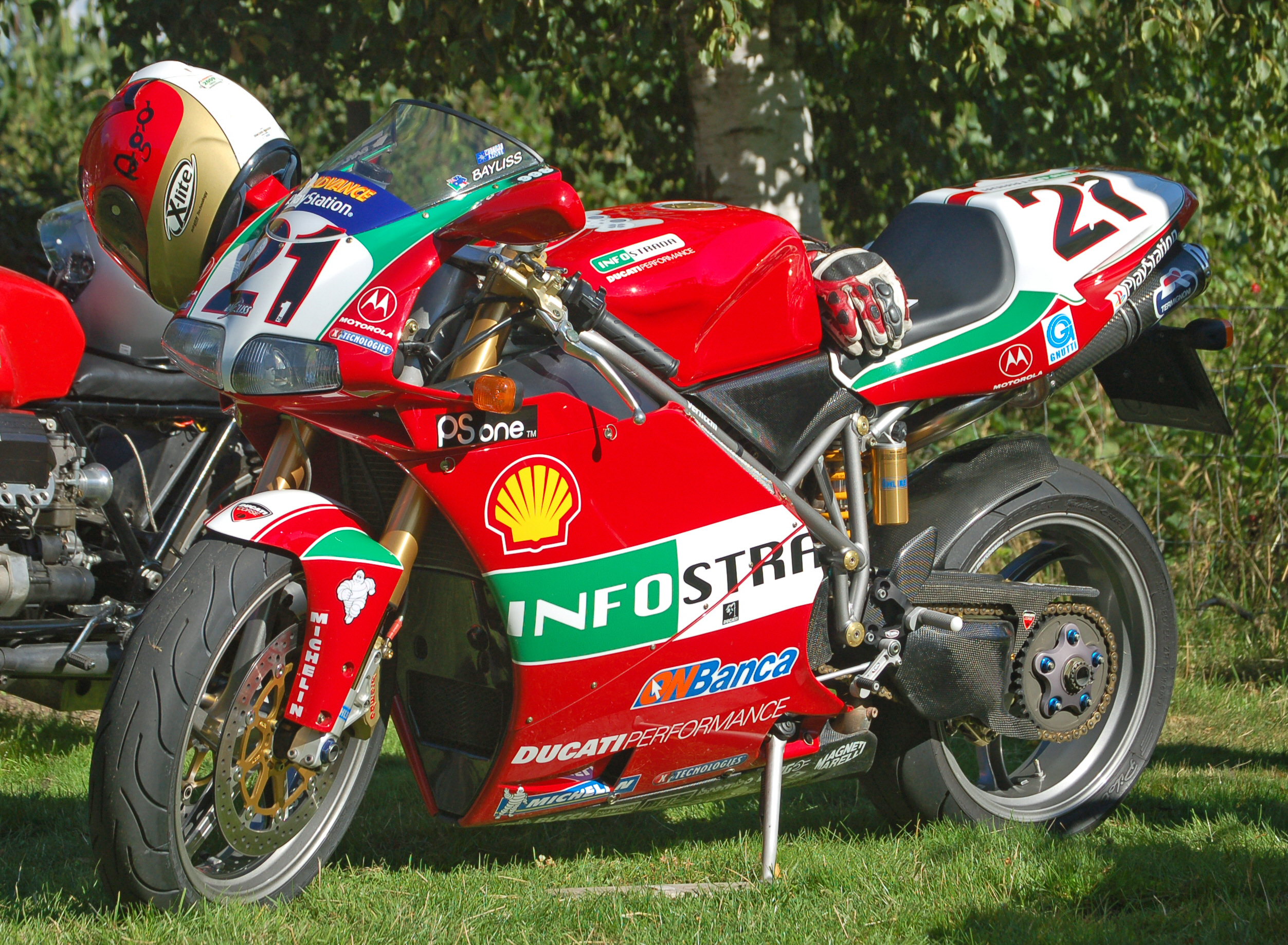 Ducati beim Oldtimertreffen auf dem Gelände des Speichenmuseums in Klein Offenseth-Sparrieshoop.